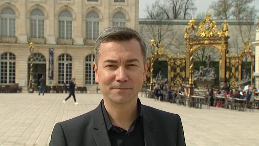 Photo